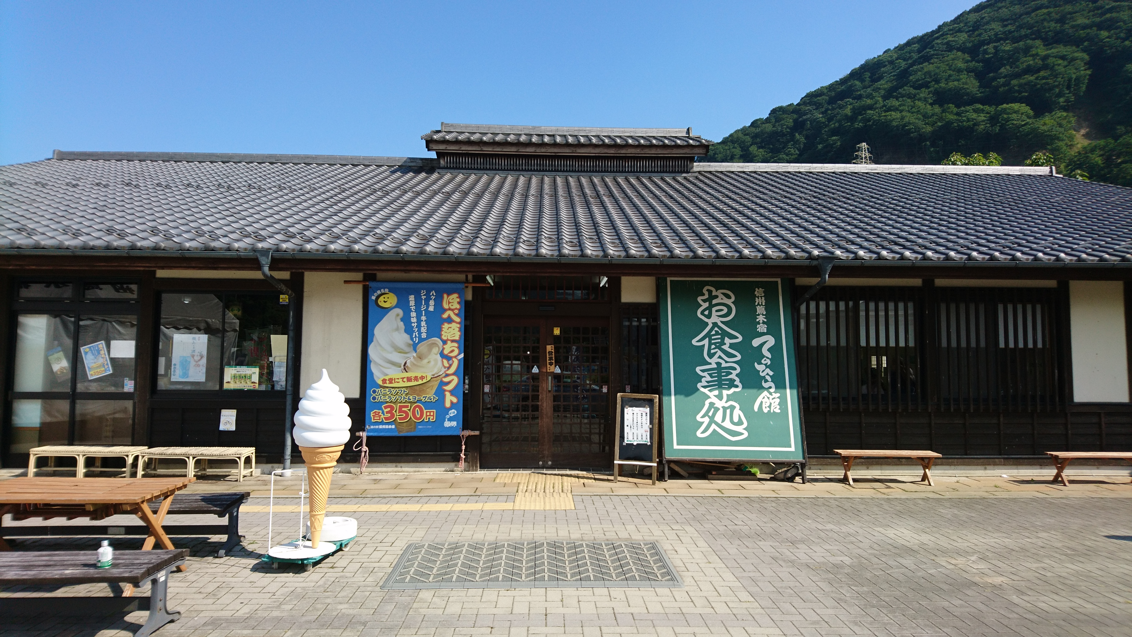 道の駅信州蔦木宿のレストラン